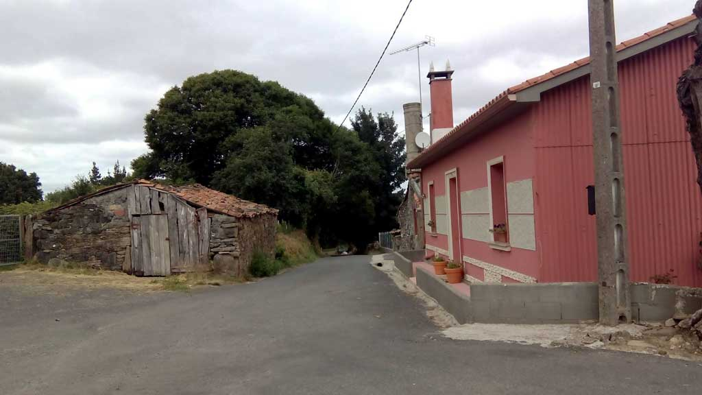 Vista de Portofoxado, Curtis.